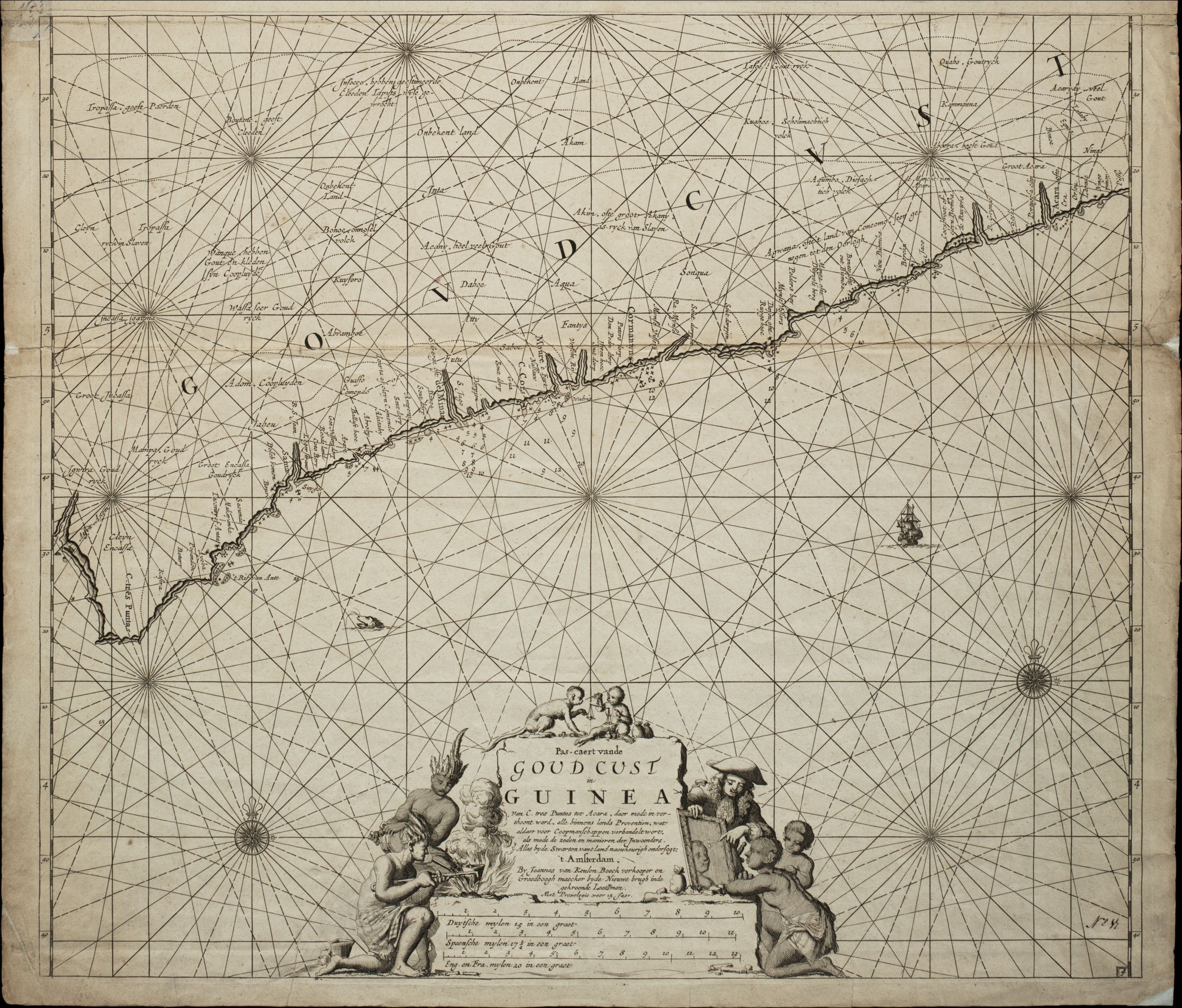 Pas-Caert van de / Goudcust / in / Guinea / van C. tres Puntas tot acara, daer mede in ver- / thoont werd, alle binnens lands Proventien, wat / aldaer voor Coopmanschappen verhandelt wort. / als mede de zeden en manieren der inwoonders. / Alles by de Swarten van t land naeukeurigh ondersogt